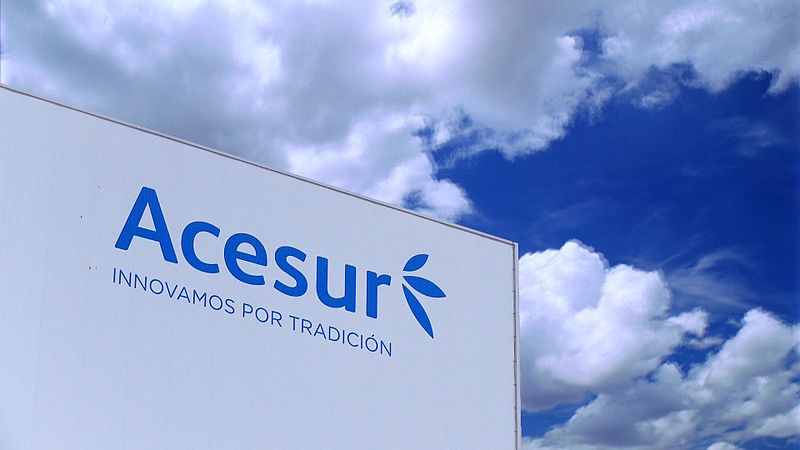 Eslogan de la empresa de aceite Aceites del Sur, Acesur.